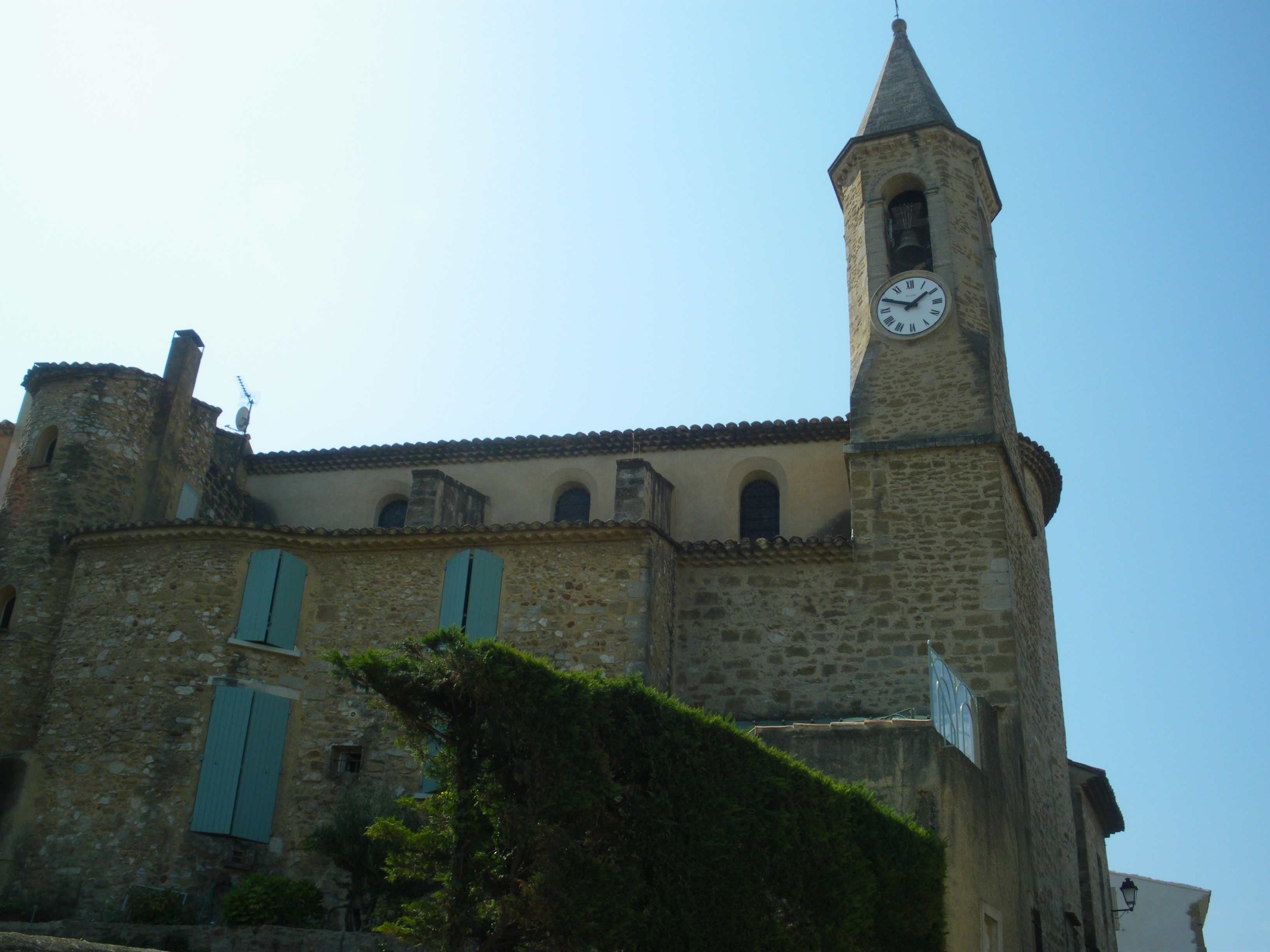 église de Jonquerrettes, Vaucluse, France